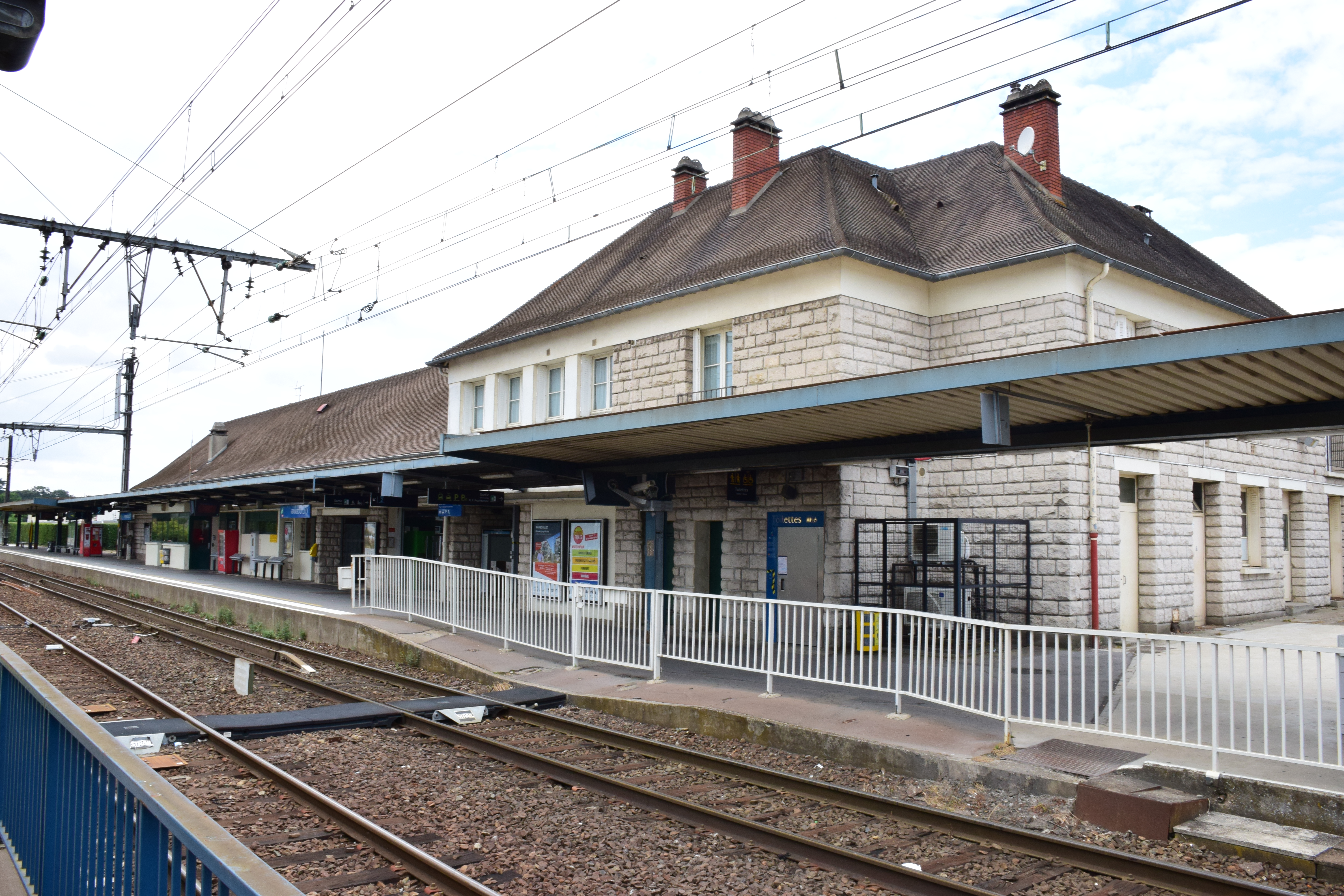 Gare de Rambouillet (Yvelines).